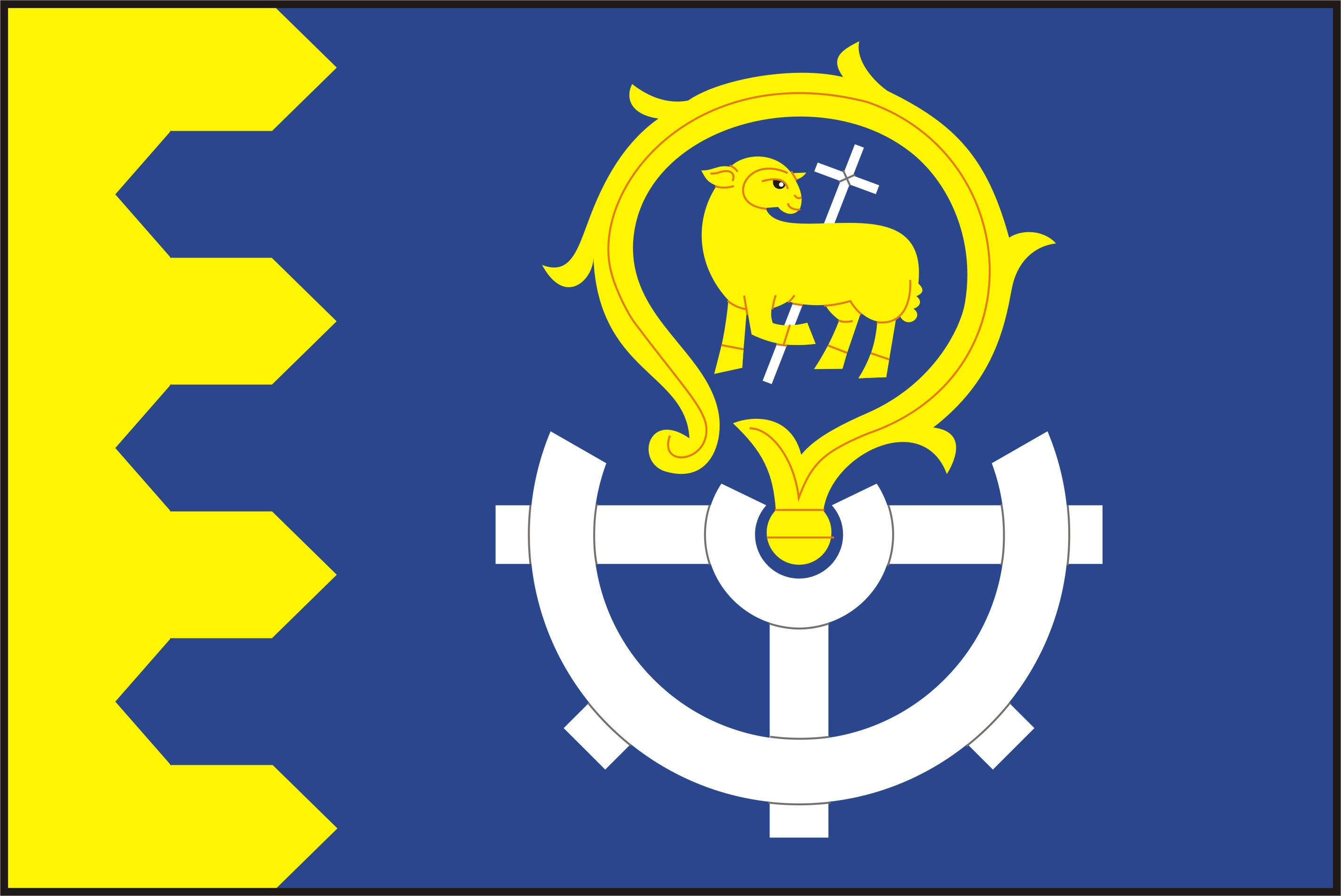 Vlajka obce Počaply